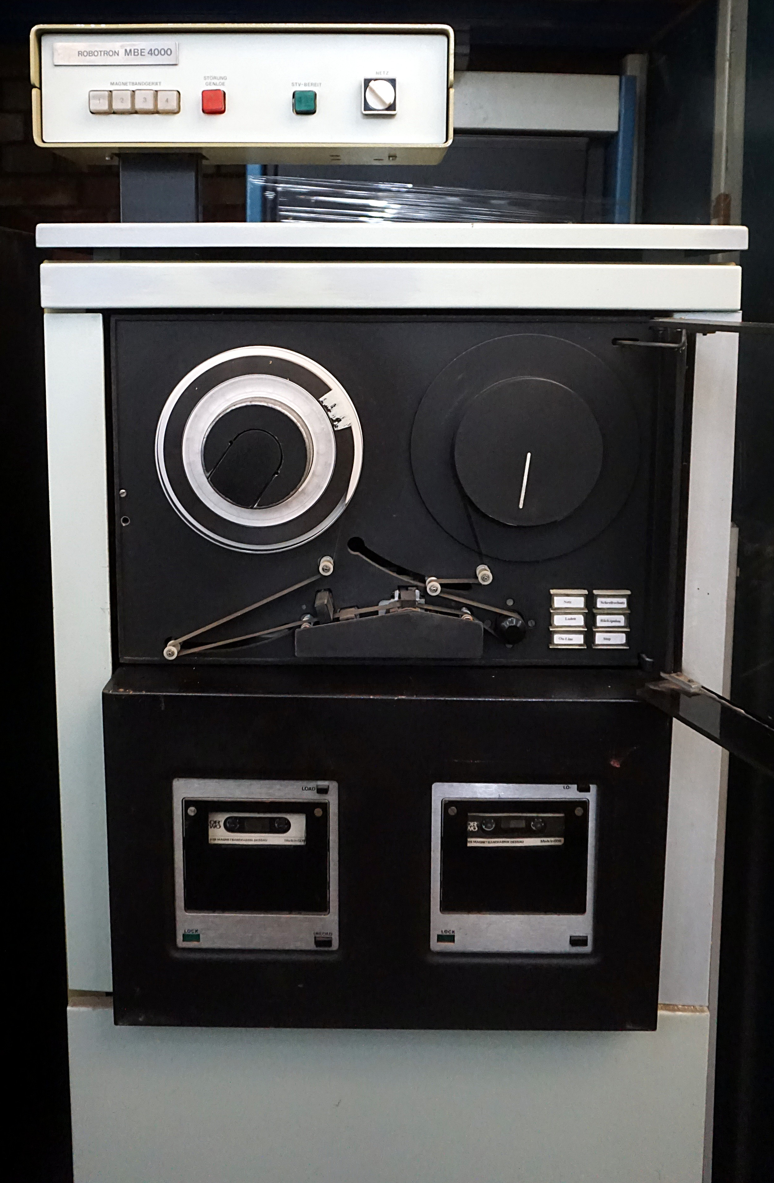 Magnetbandeinheit Robotron MBE 4000 aus der ehem. DDR. Bestückt mit einem Magnetbandspeicherlaufwerk und zwei Datasettenlaufwerken. Im Depot des Thüringer Museums für Elektrotechnik in Erfurt.